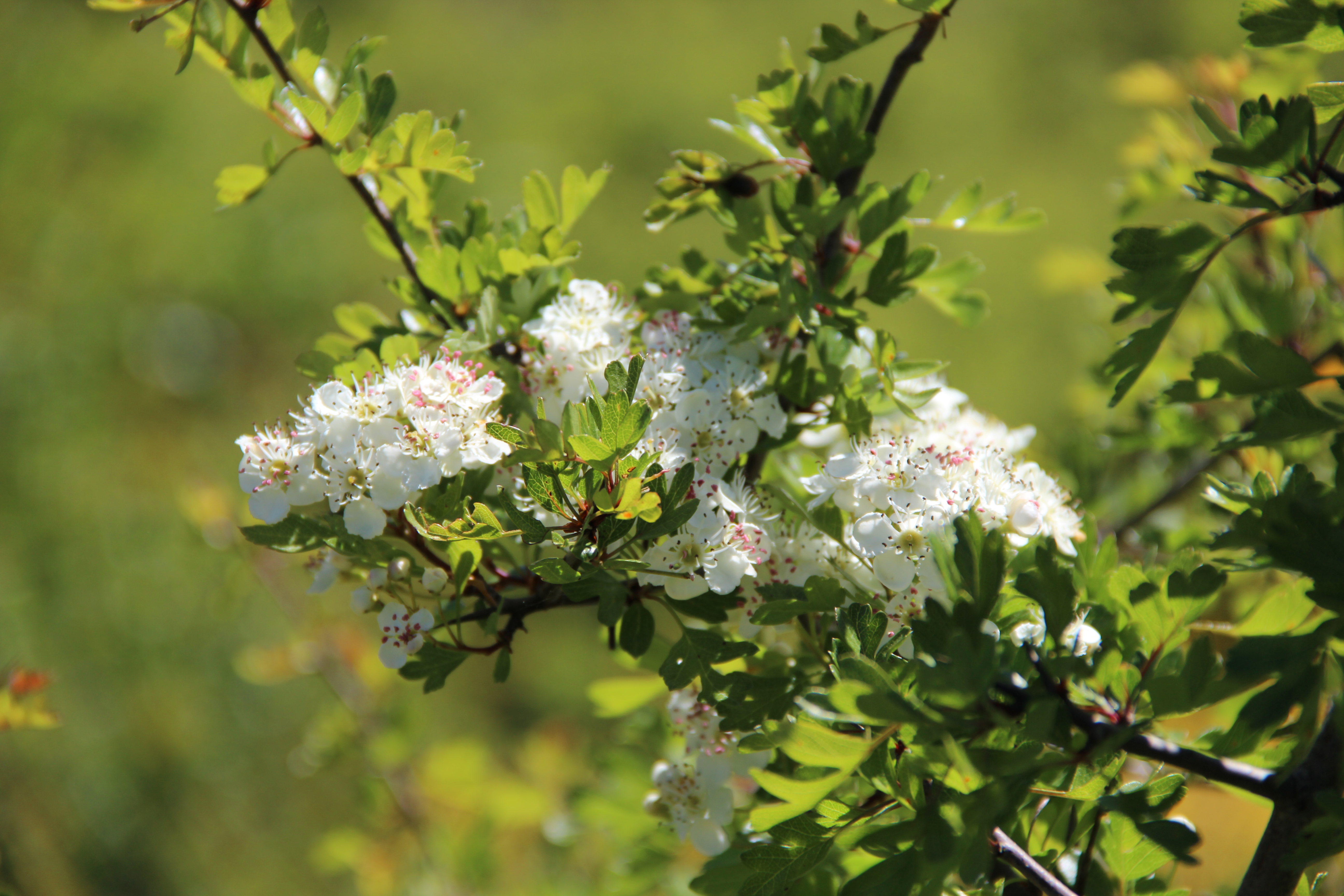 Majuelos en Arnedo de Valdebezana